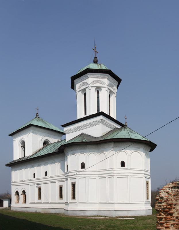 Manastirea Mamu: biserica dinspre sud-est 01